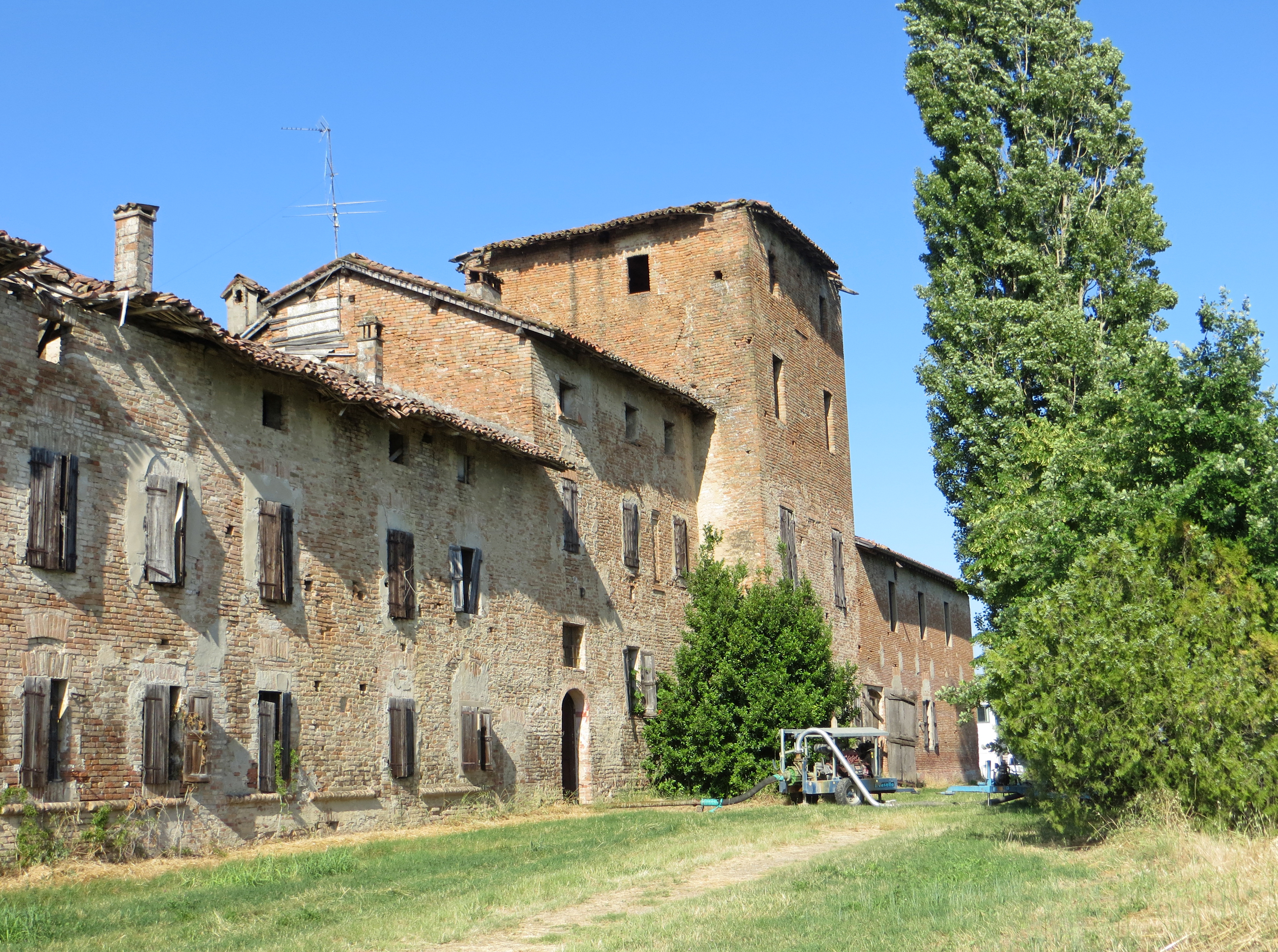 Abbazia (Castione Marchesi, Fidenza) - facciata sud